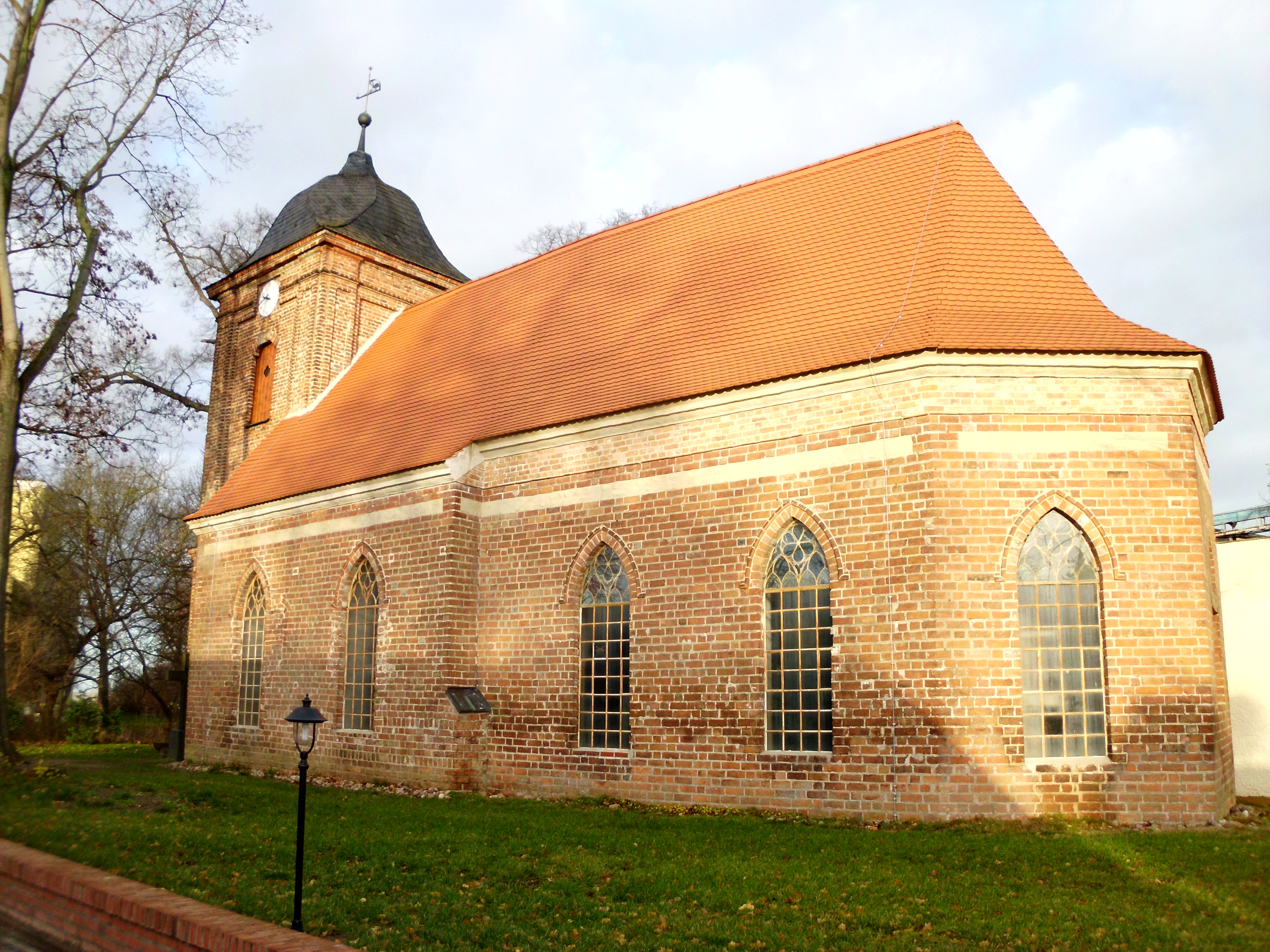 Dorfkirche in Selbelang, Paulinenaue, Landkreis Havelland